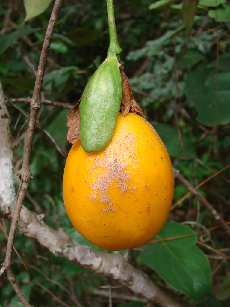 Fruit of Passiflora nitida Kunth - PASSIFLORACEAE - Jardim Botânico de Brasília - Distrito Federal - Brasil.